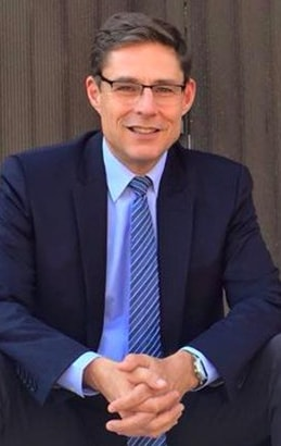 Sénateur Philippe DALLIER au soir des élections sénatoriales du 24 septembre 2017 devant la préfecture de Seine-Saint-Denis à Bobigny.